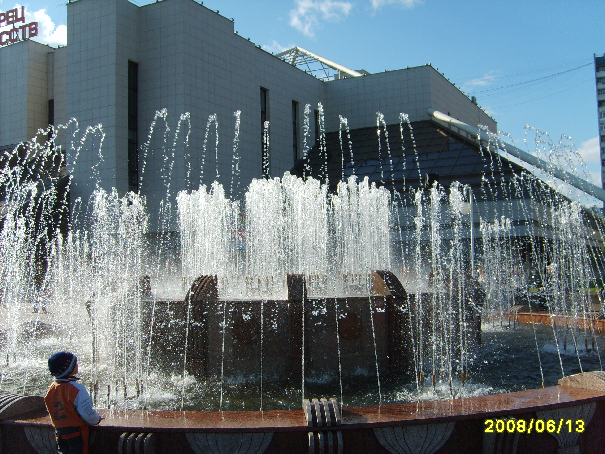 Нижневартовск, фонтан около дворца искусств